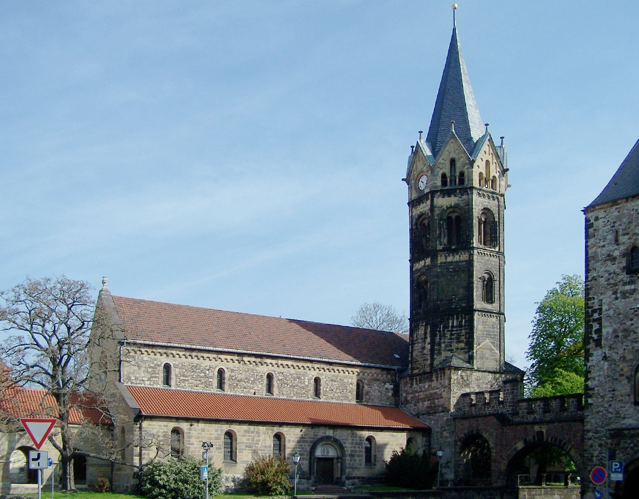 Nikolaikirche